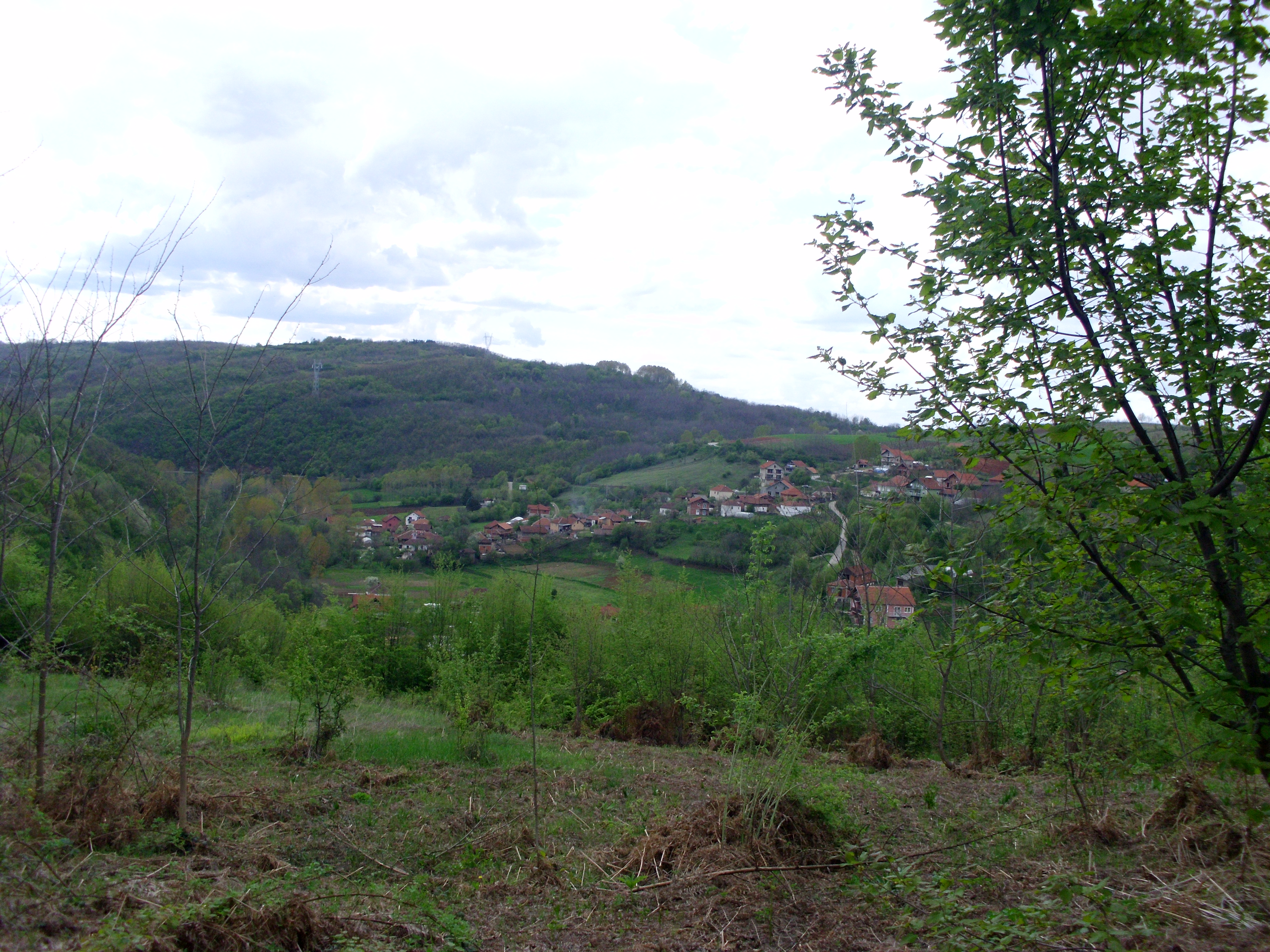 Selo Kozare u Opštini Leskovac.